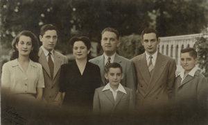 RGS hijos